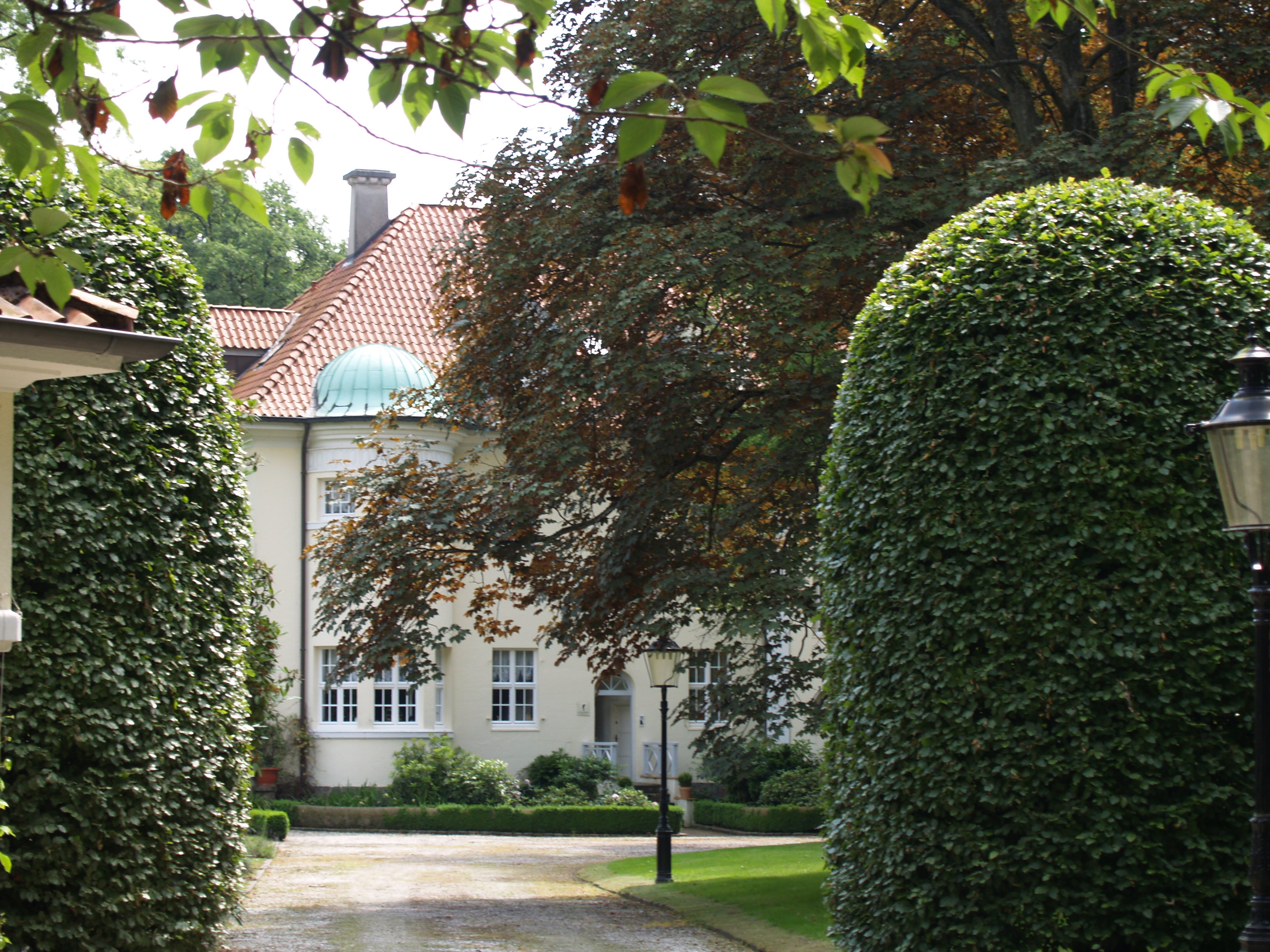 Villa Miraflores in Wentorf, Herzogtum Lauenburg, Deutschland